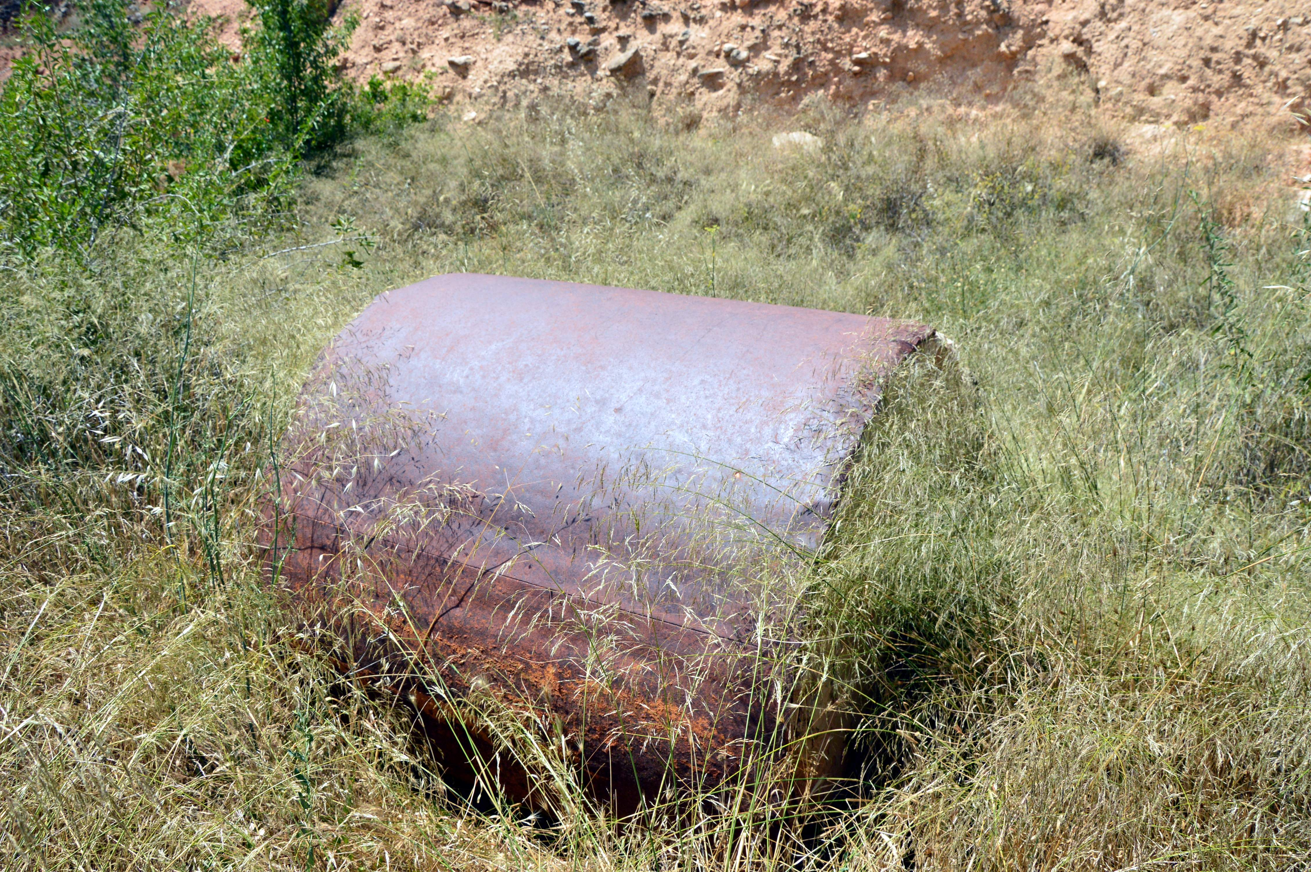 Detalle del rulo utilizado como apisonadora en la construcción de la carretera N-330 (antigua C-234), en Casasbajas (Valencia), 2018.